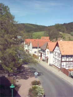 Krauthausen (Thüringen)